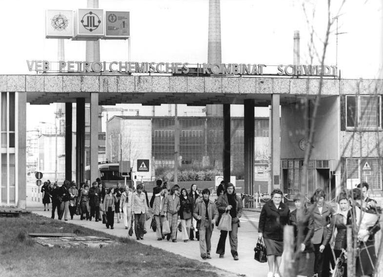 Für Bezieher des ADN-Reportagedienstes! Zum Beitrag: Als das erste Öl ankam...-Familie Helmerich seit fünfzehn Jahren in Schwedt zu Hause ADN-ZB-Zimmermann - 5.7.79 - bb Werkeingang des Petrolchemischen Kombinates Schwedt an der Oder. (Bitte beachten Sie hierzu auch U0705-308N und 310N - 312N!)